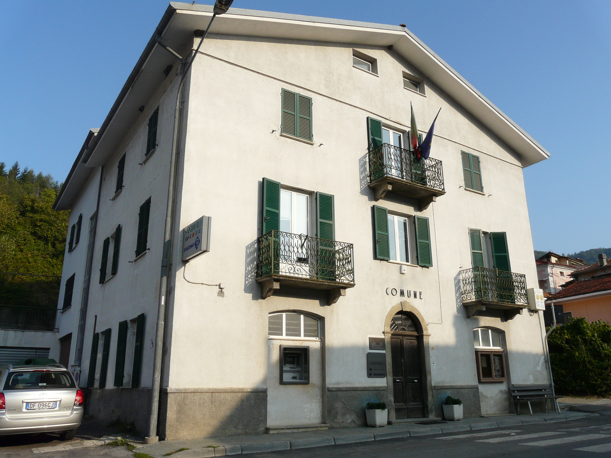 Municipio di Murialdo, Liguria, Italia